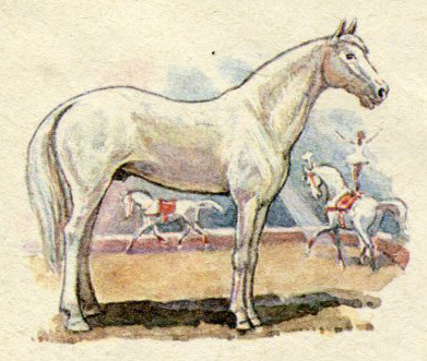 Лошадь терской породы